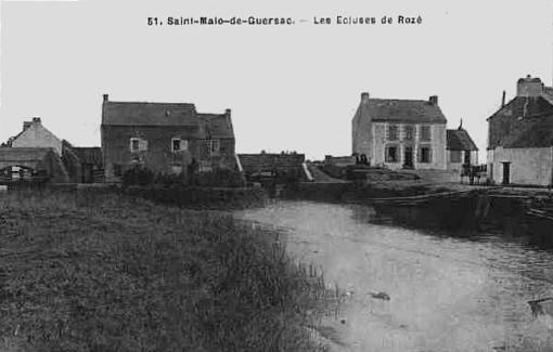 saint malo de guersac -- Maison de l'éclusier